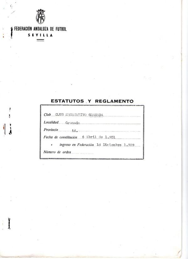 Primeros estatutos del Granada Club de Fútbol,con su denominación anterior como Club Recreativo Granada